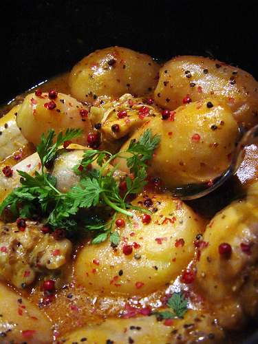 Fricassée de poulet au vinaigre doux